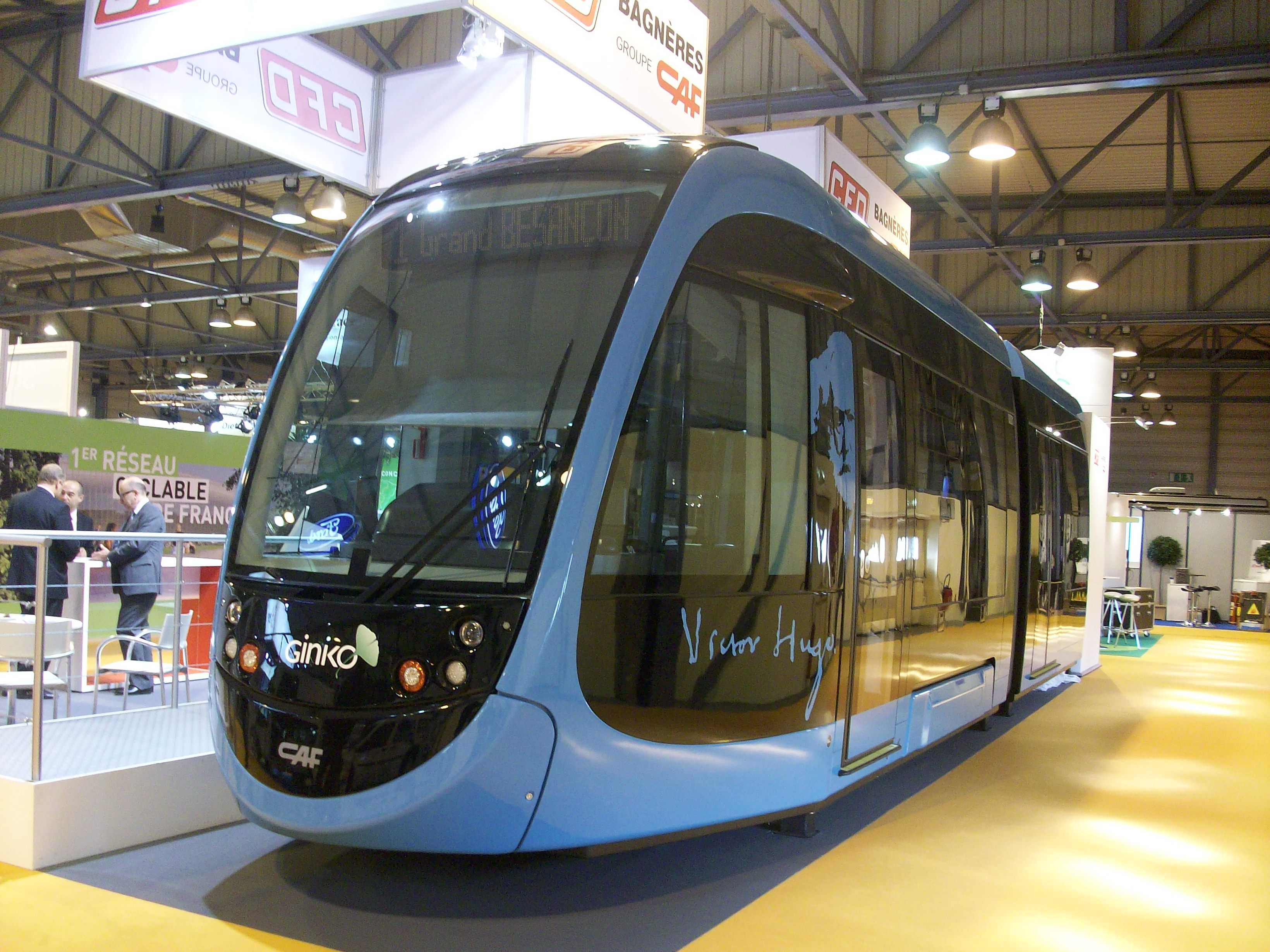 Maquette du tramway CAF de Besançon exposé aux 23e RNTP, Strasbourg